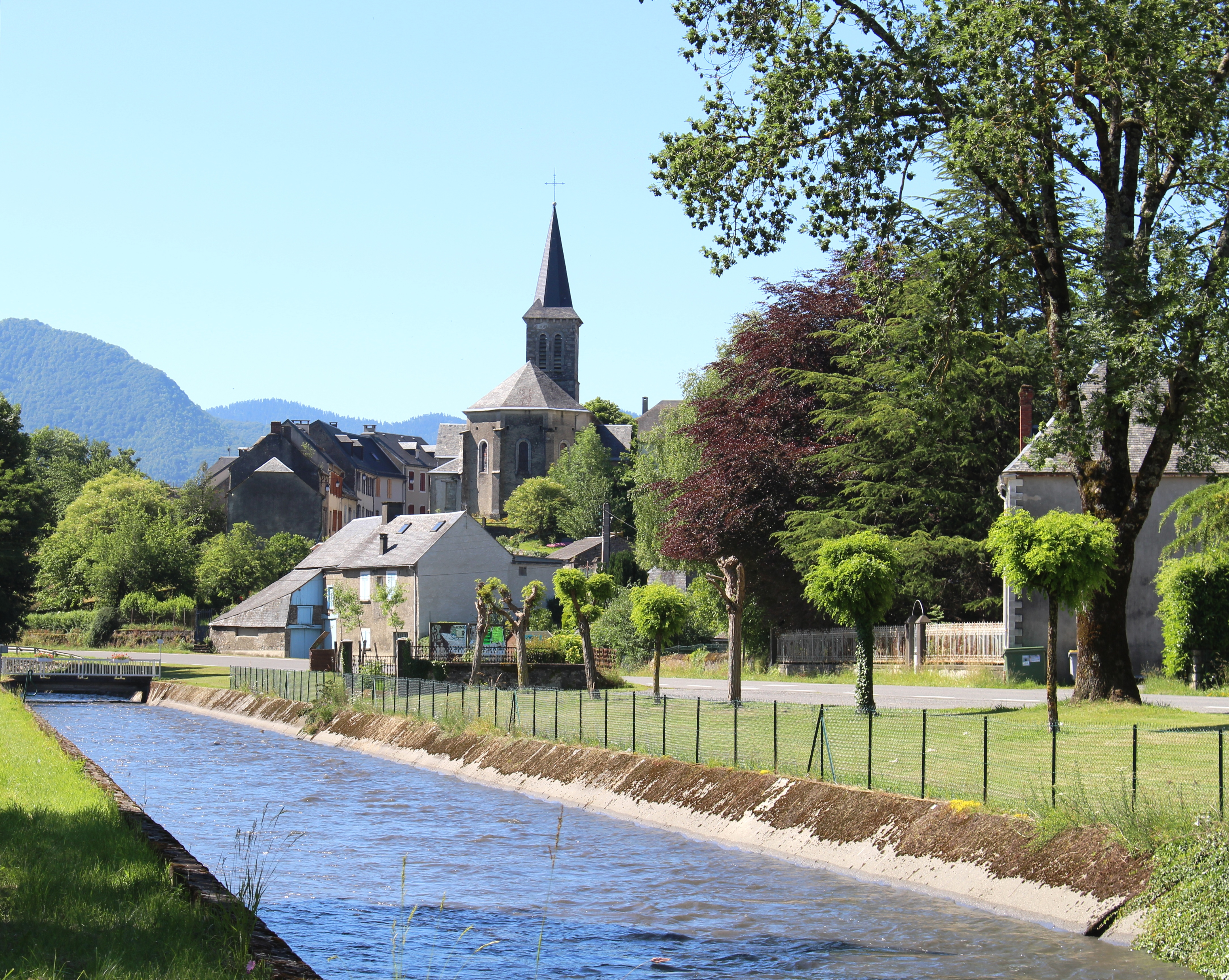 Canal de la Neste à Hèches (Hautes-Pyrénées)